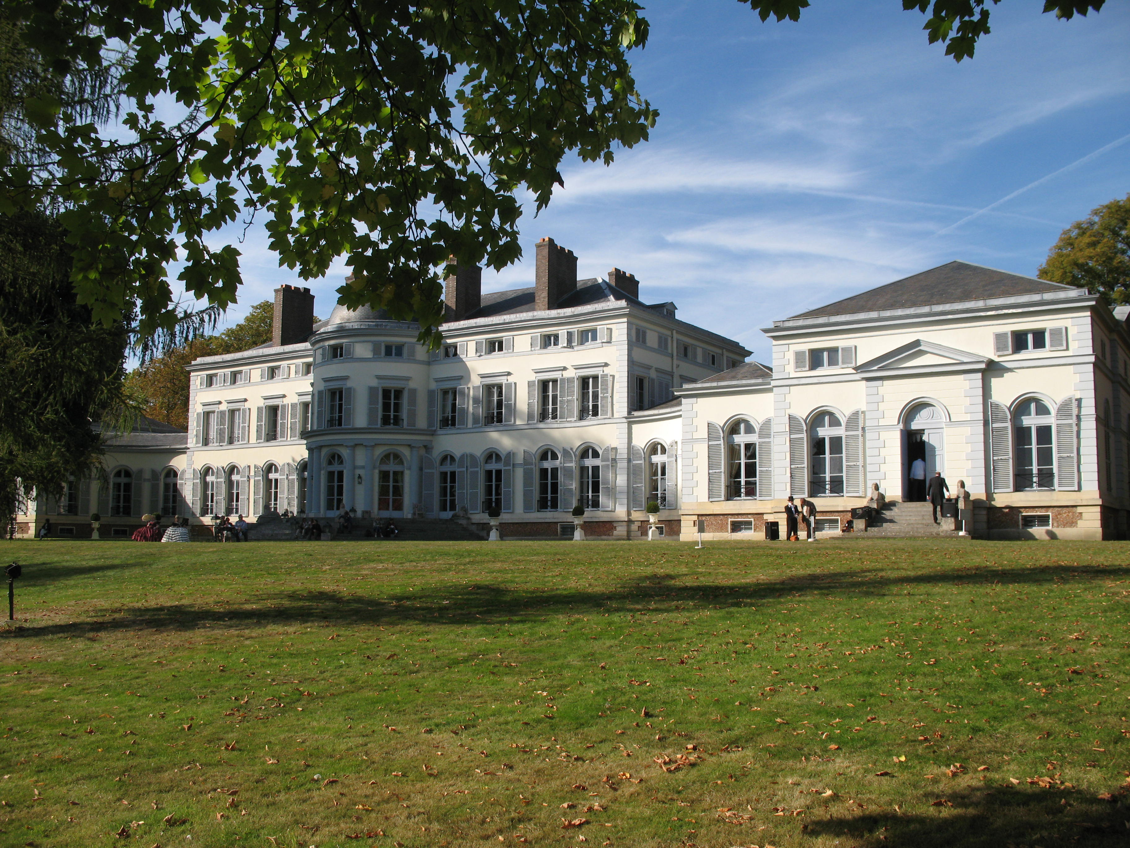 Vue générale du château de Groussay à Montfort-l'Amaury (France)